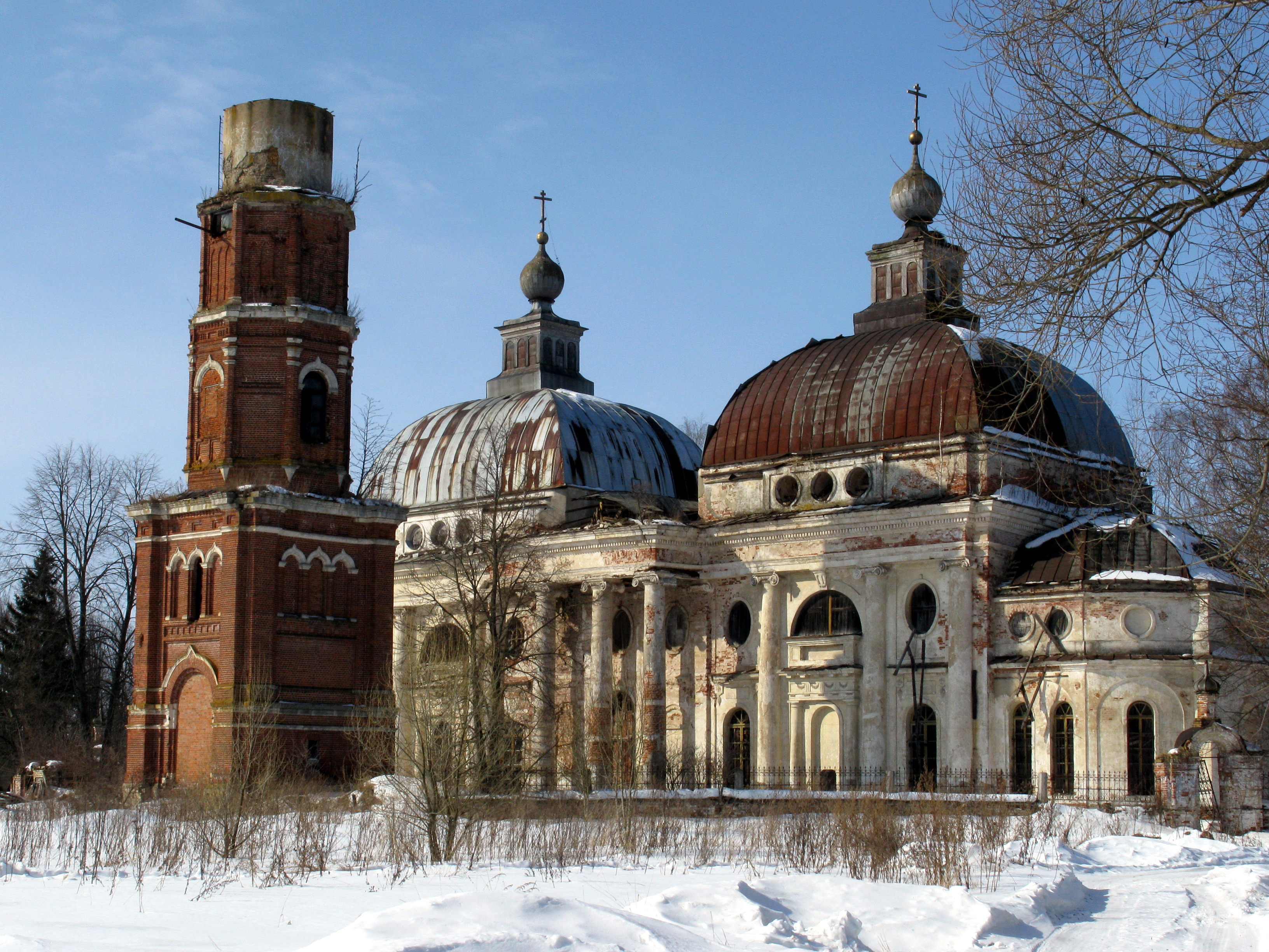 Храм Казанской иконы Божией Матери в селе Ярополец